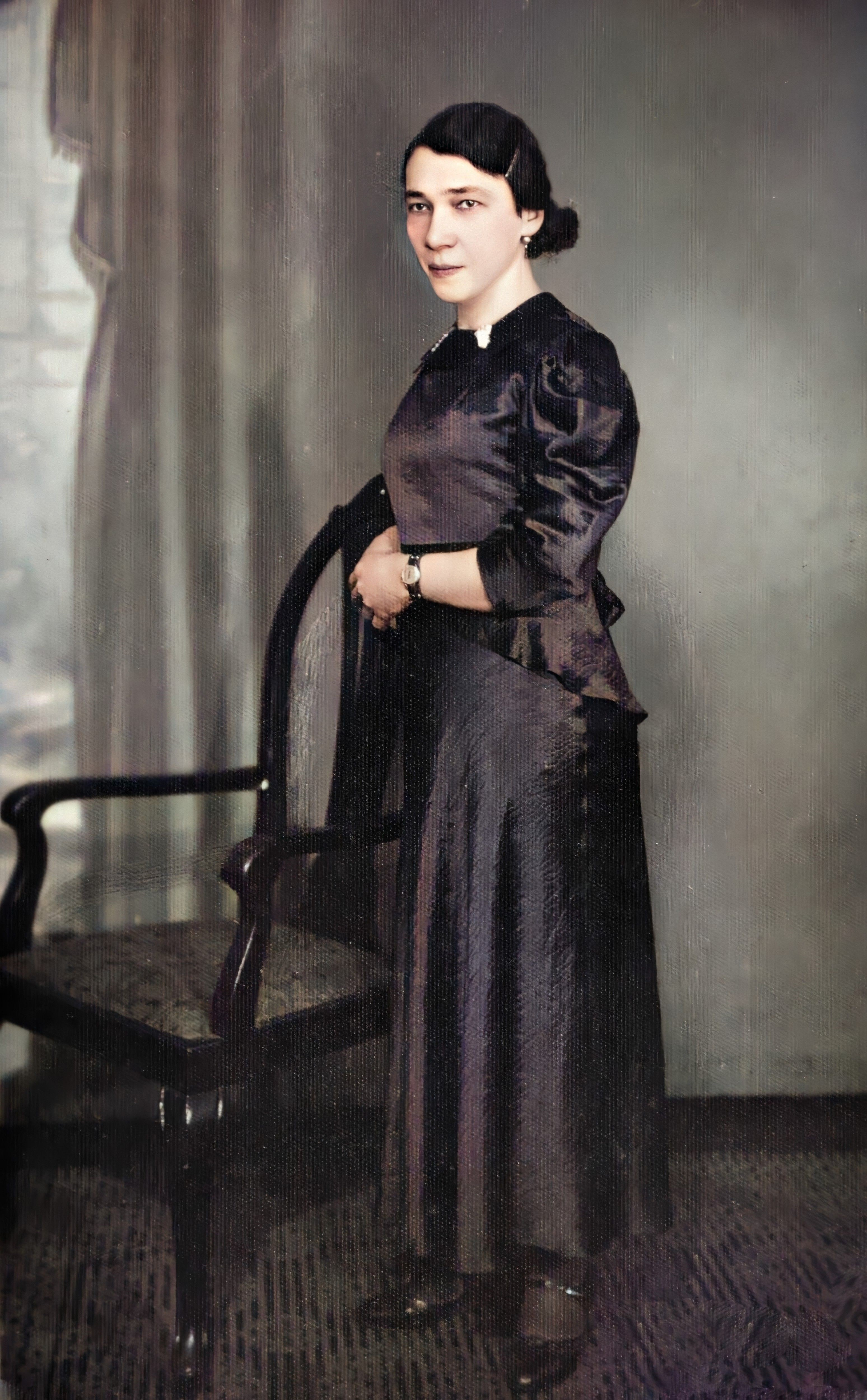 Maria Krzyżowska, siostra Stanisława Krzyżowskiego